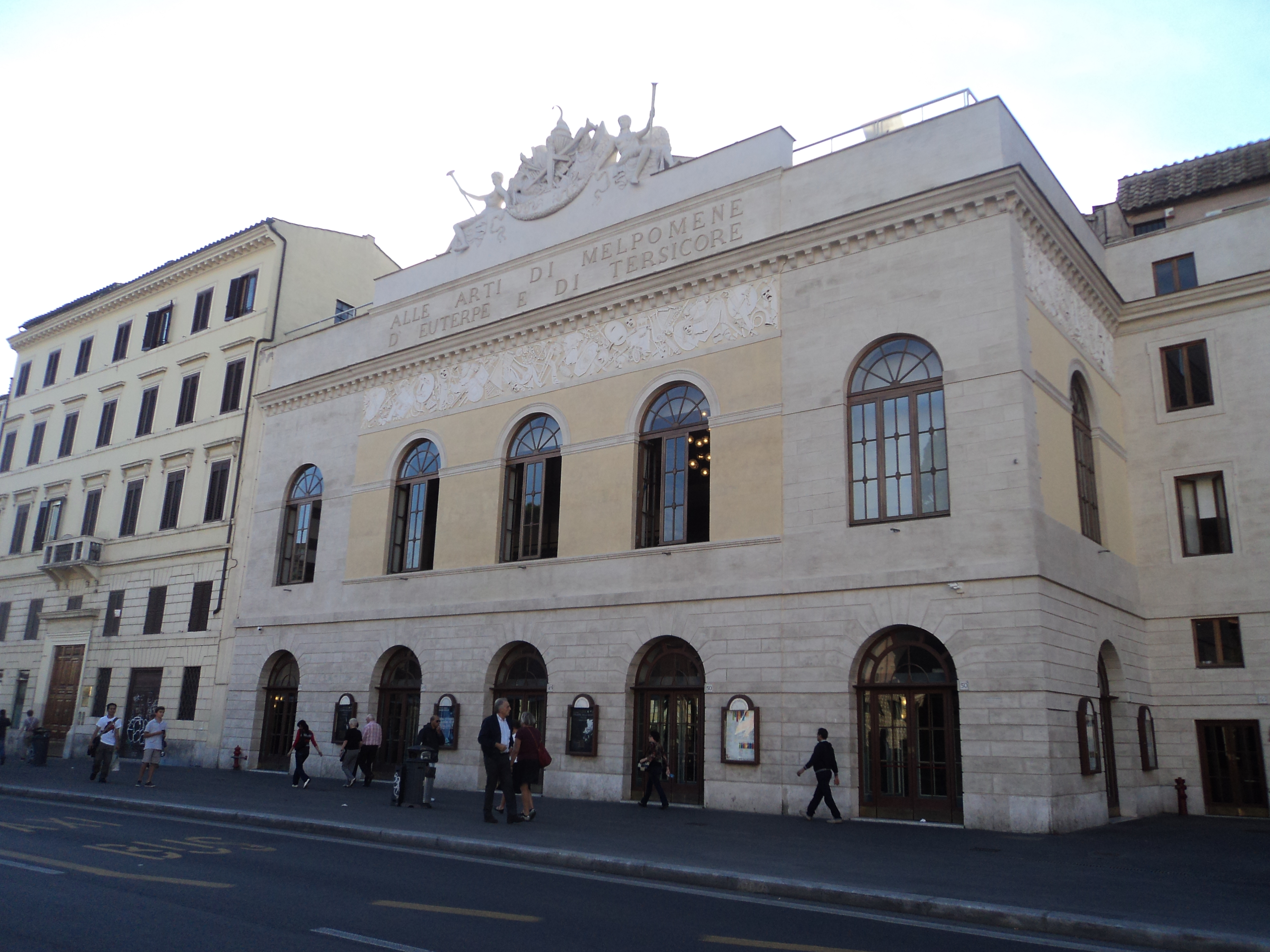 Teatro Argentina